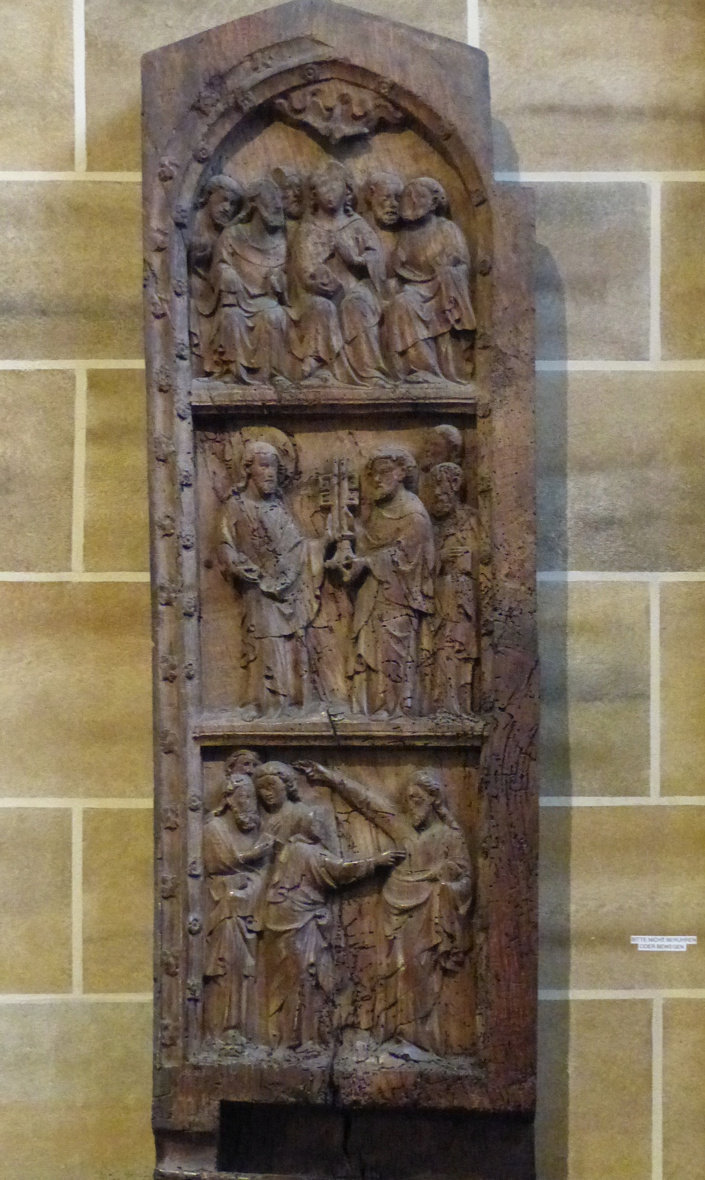 Bremer Dom, 3. Kapelle von Westen, 3. Chorgestühlswange. Von unten nach oben: Der Ungläubige Thomas, Schlüsselübergabe an Petrus, Pfingstwunder. Um 1360, Eichenholz.